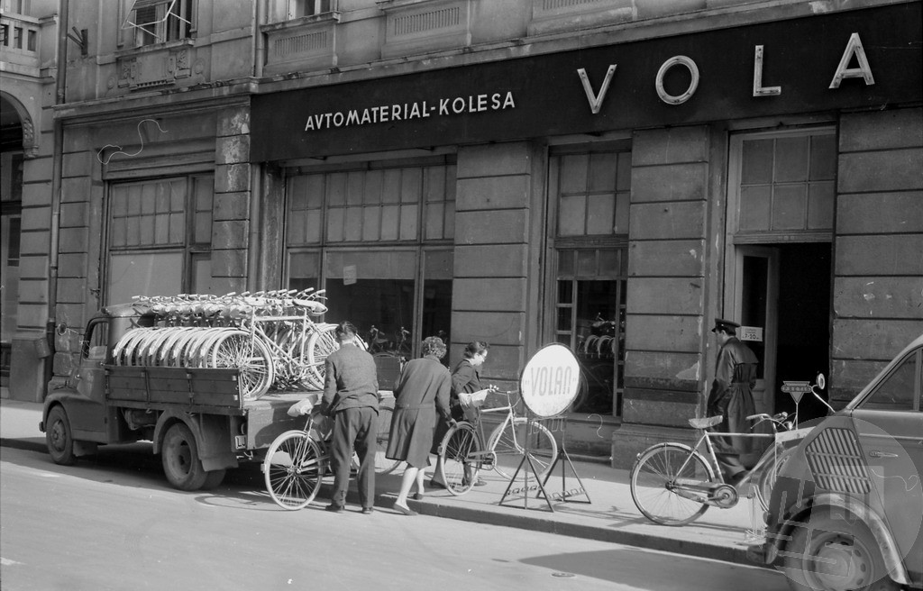 Največ povpraševanja po Rogovih športnih kolesih.